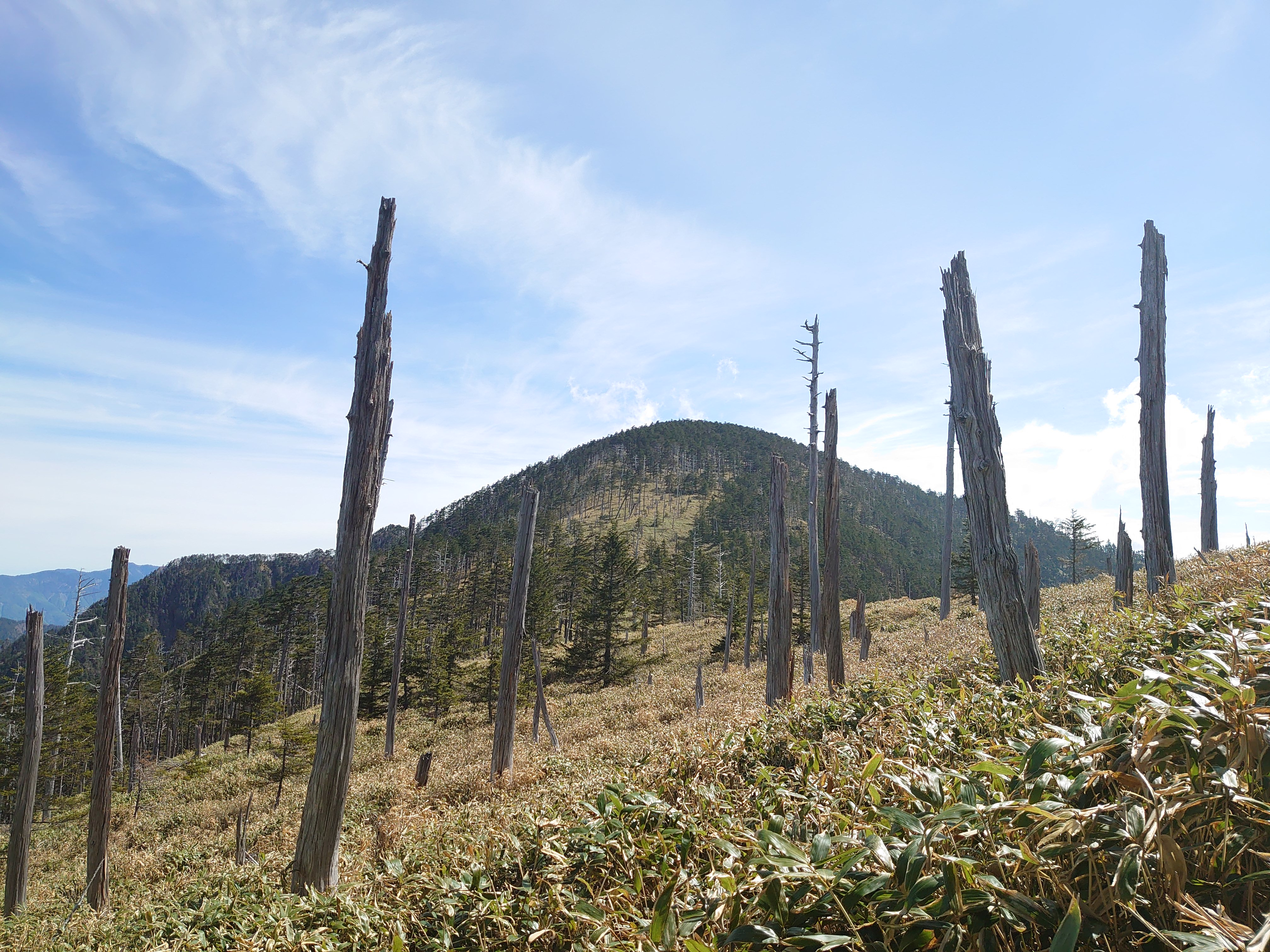 南西方面から中ノ尾根山を撮影